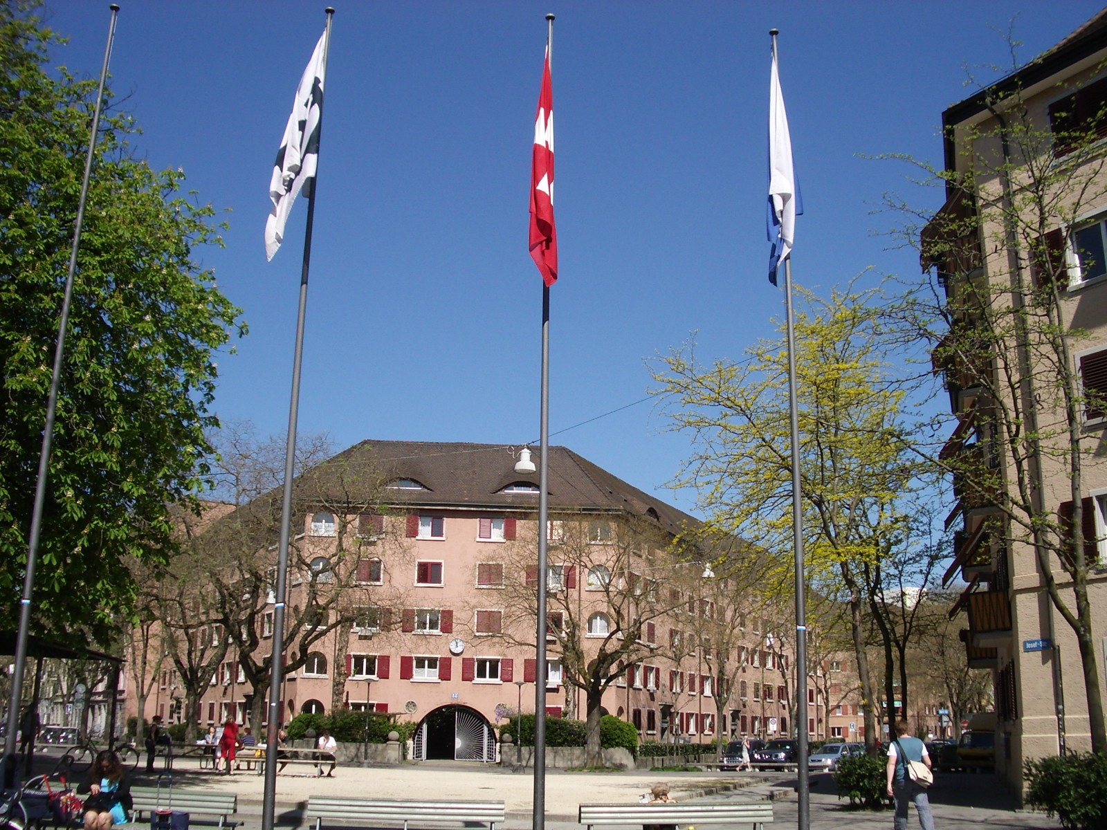 Zurich, Switzerland self-made, April 2007